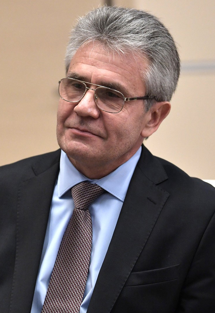 Избранный президент Российской академии наук Александр Сергеев во время встречи с Президентом России Владимиром Путиным